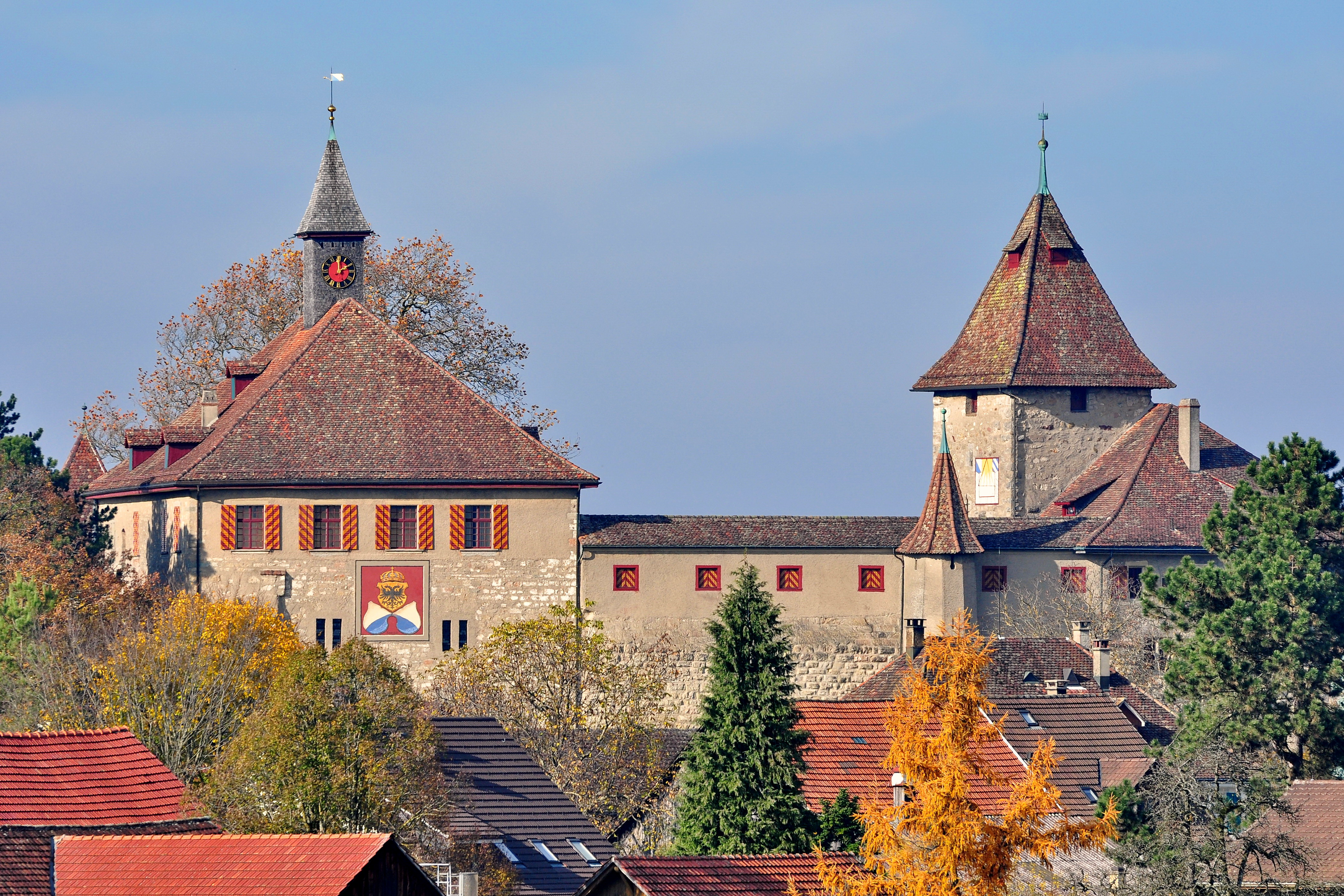 Schloss Kyburg in Kyburg (Switzerland)